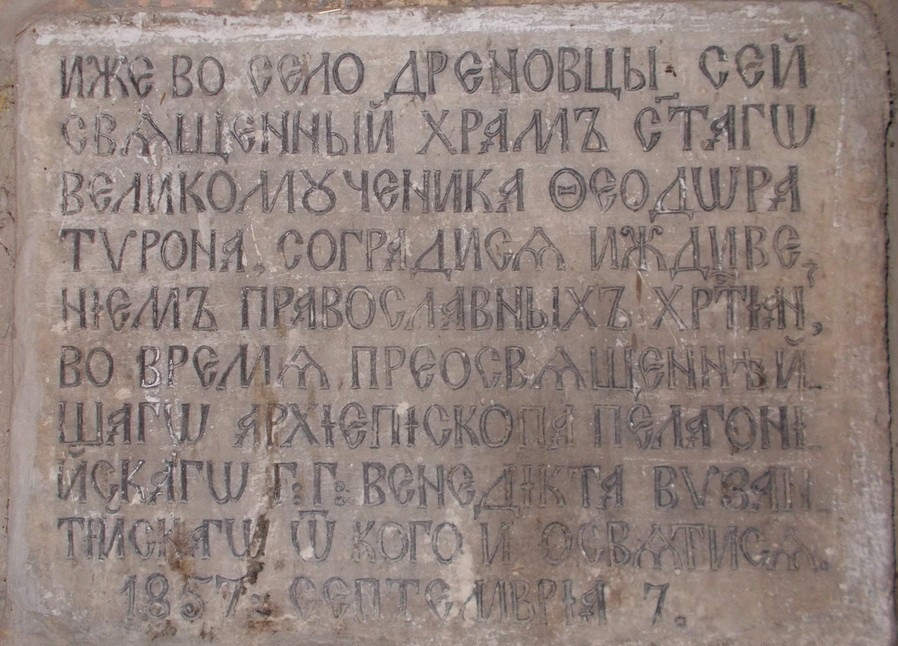 Надпис в църквата „Свети Теодор Тирон“ в Дреновци